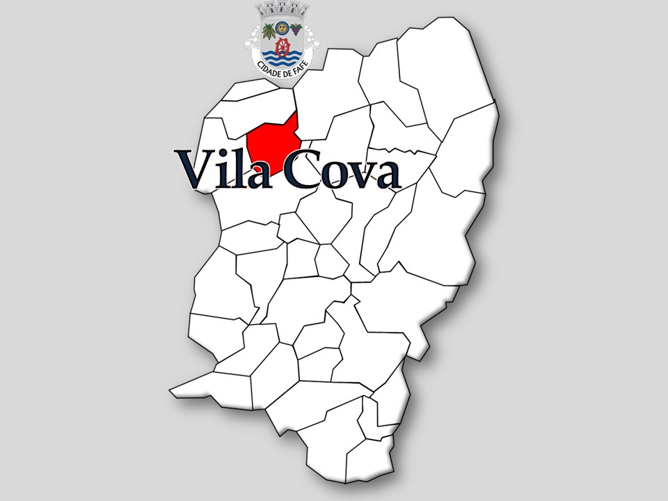 Censos 1864/2011